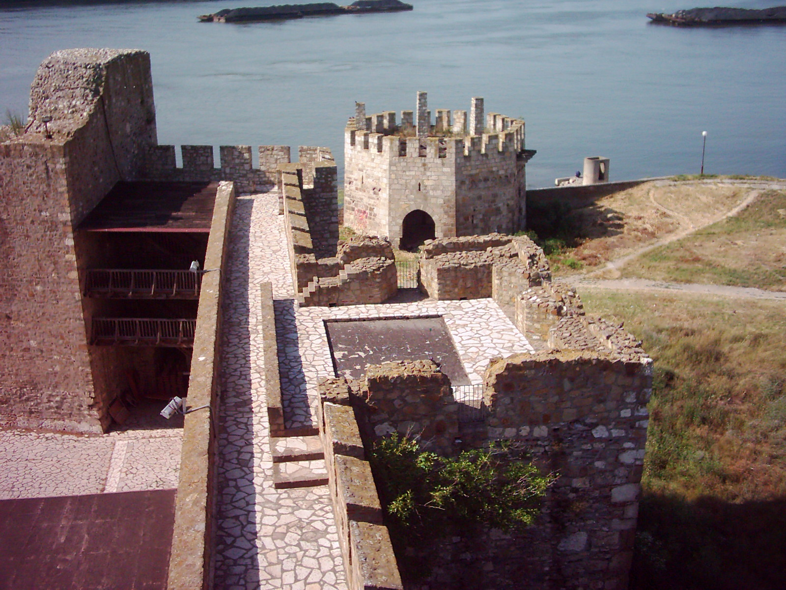 My picture. My editing. I give it (the picture) to the world.